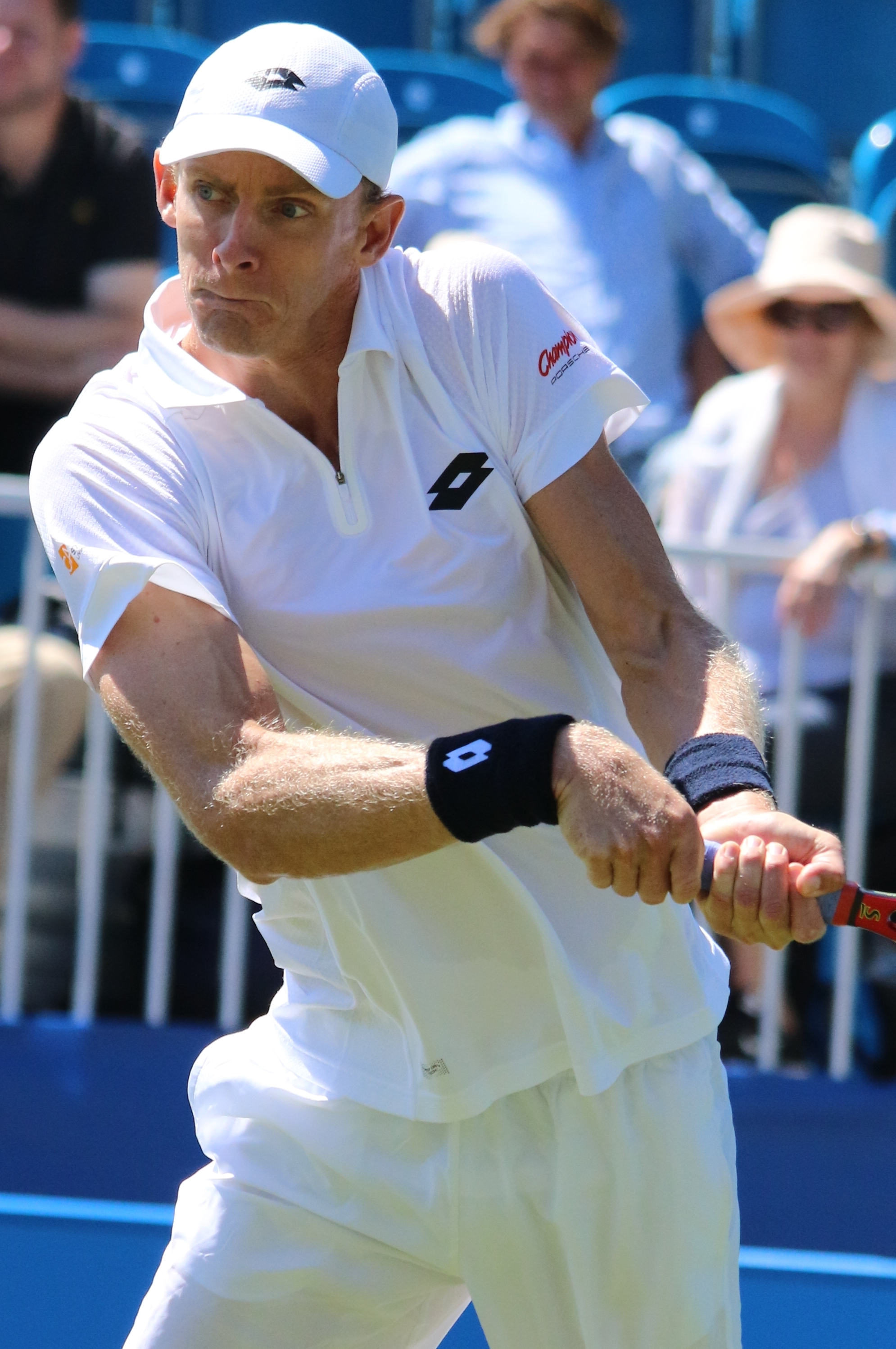 Anderson EBN17 (20)